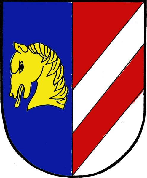 Znak obce Kobylá nad Vidnavou